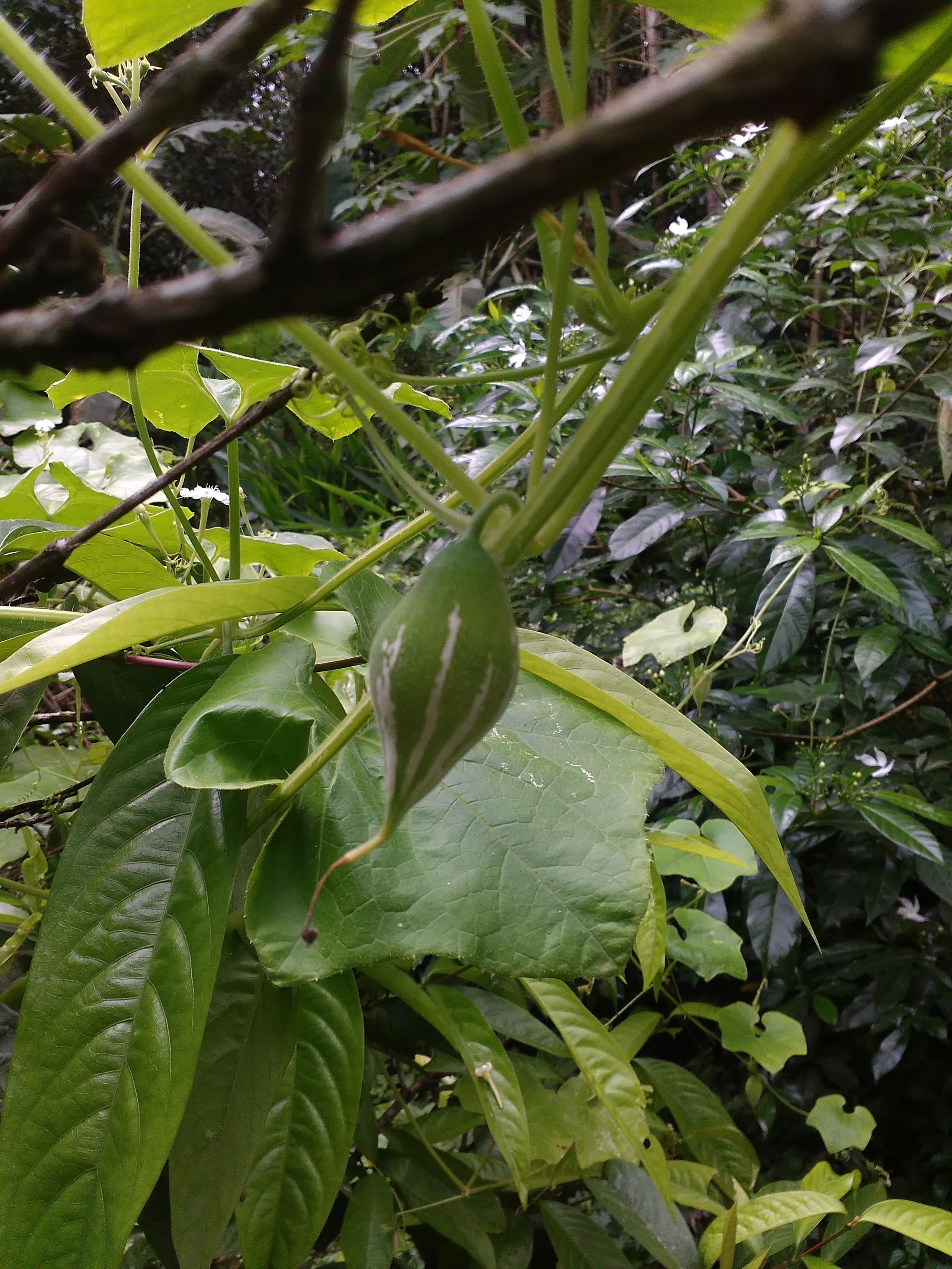 kattupadavalam. (Trichosanthes dioica). photo Taken from Vellakkat mana